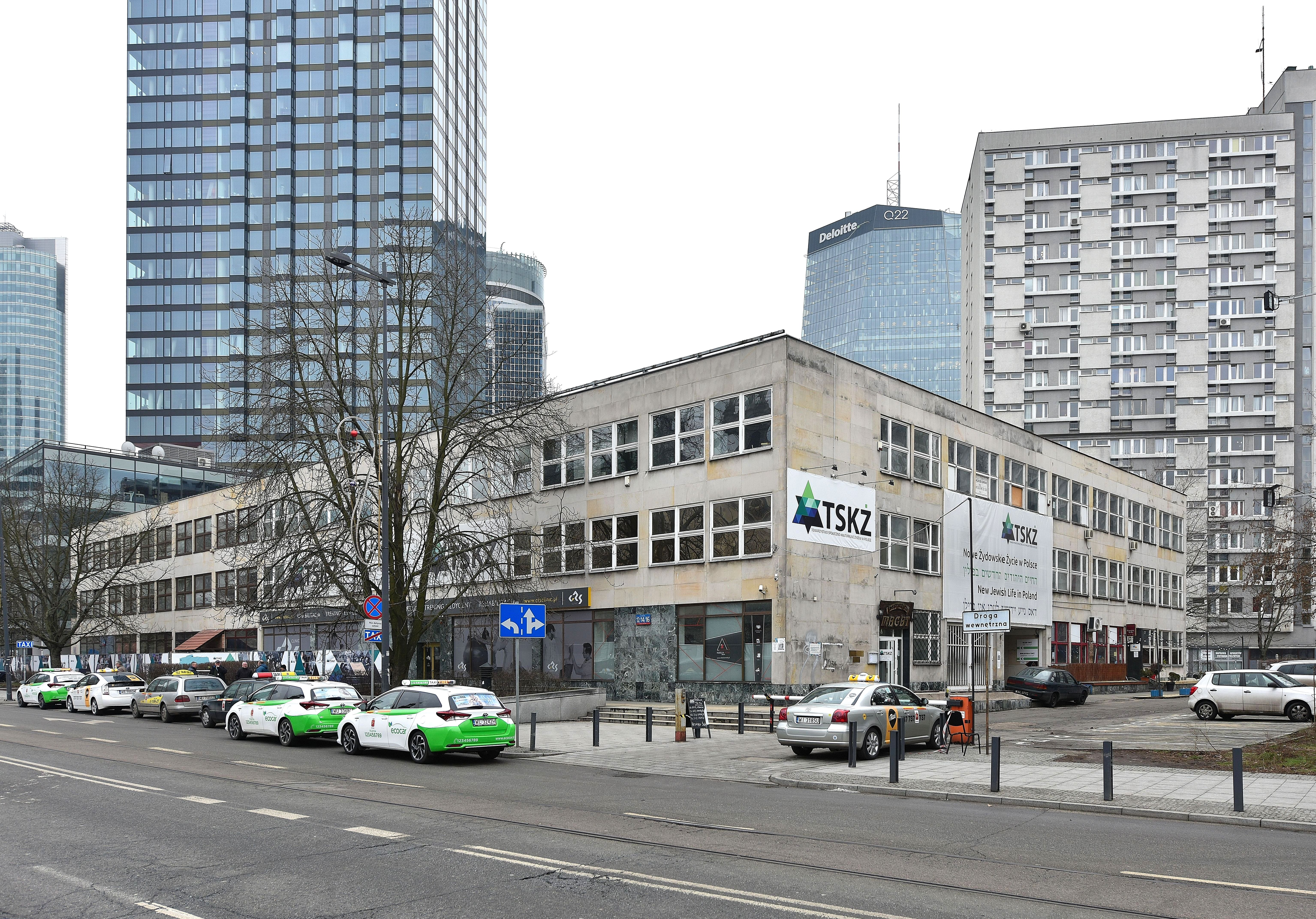 Budynek Teatru Żydowskiego i Towarzystwa Społeczno-Kulturalne Żydów w Polsce przy placu Grzybowskim 12/14/16 w Warszawie